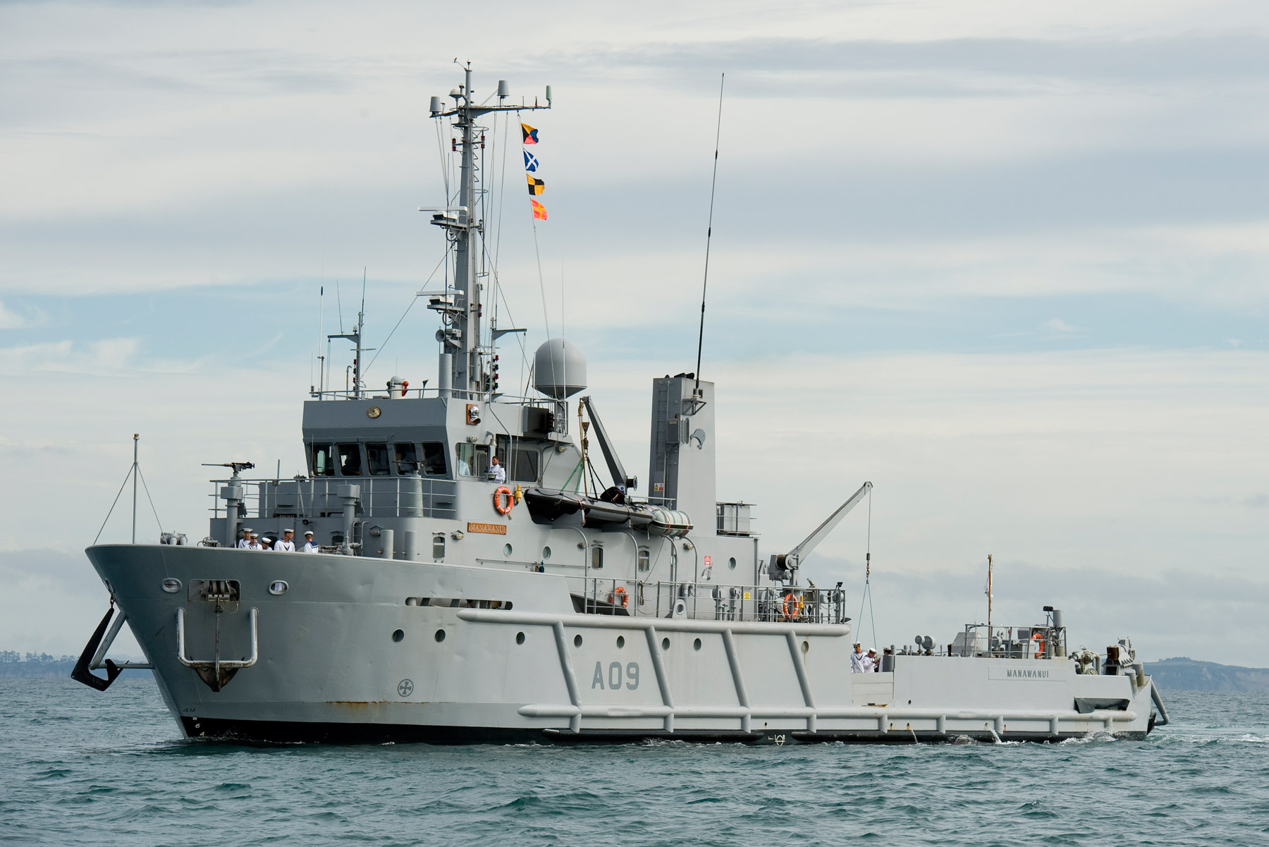 HMNZS Manawanui in 2010